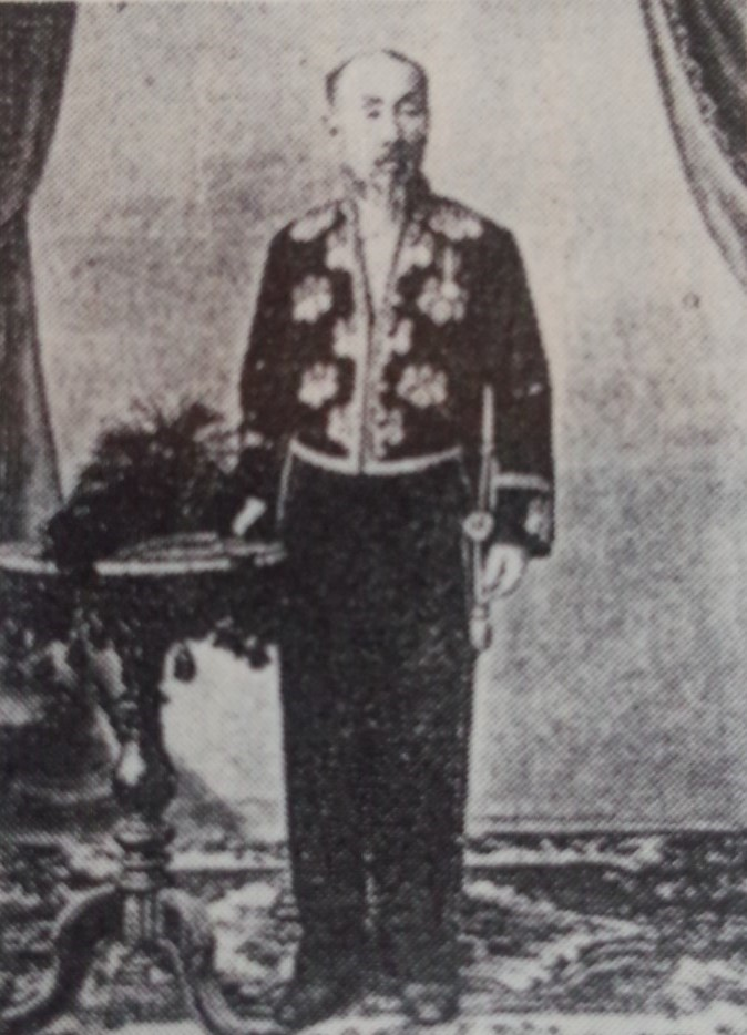 前田利聲(声)の肖像写真。